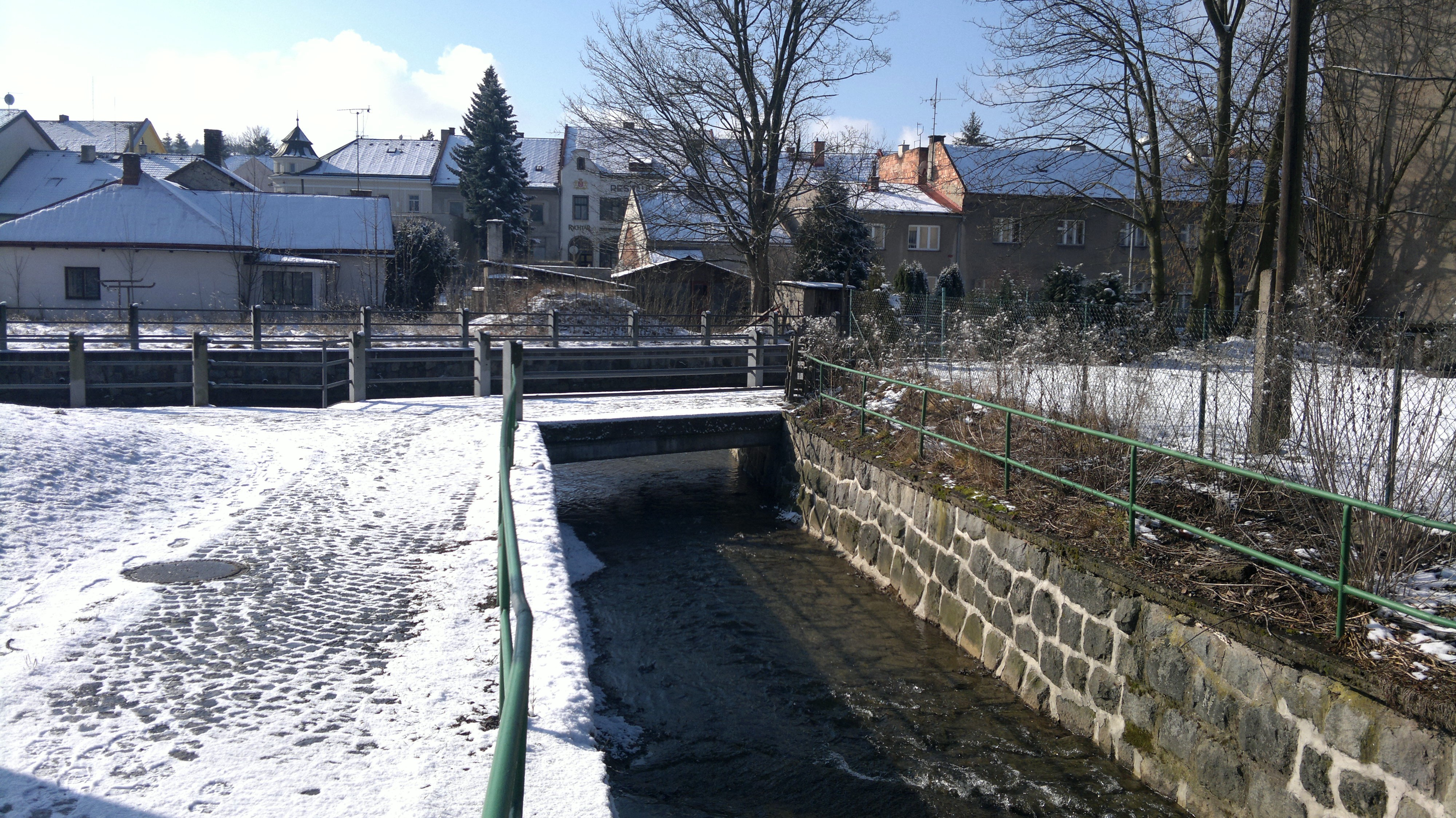 Ústí Drachtinky do řeky Chrudimky v Hlinsku